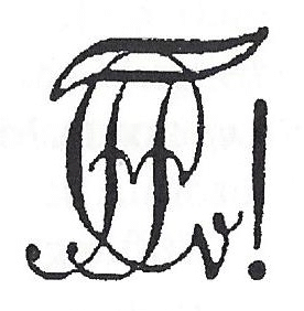 Zirkel des Corps Franconia zu Tübingen